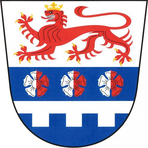 Vidice, okres Domažlice, znak